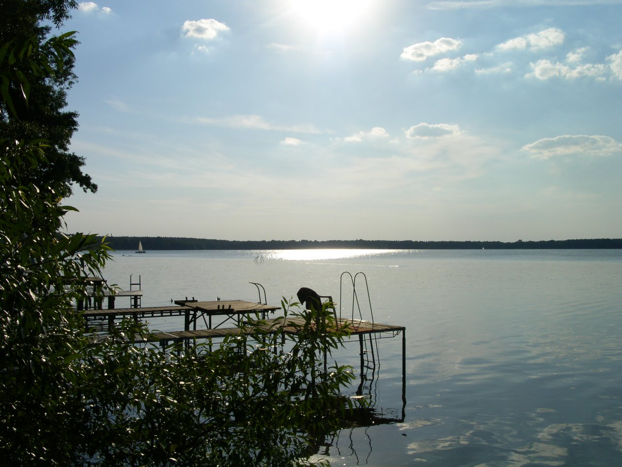 Blick auf den Arendsee in der gleichnamigen Stadt Arendsee